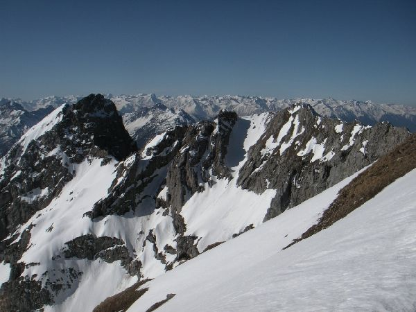 Teilabschnitt des Mittenwalder Höhenwegs: Linderspitze (rechts) bis Sulzleklamm SPitze (links)